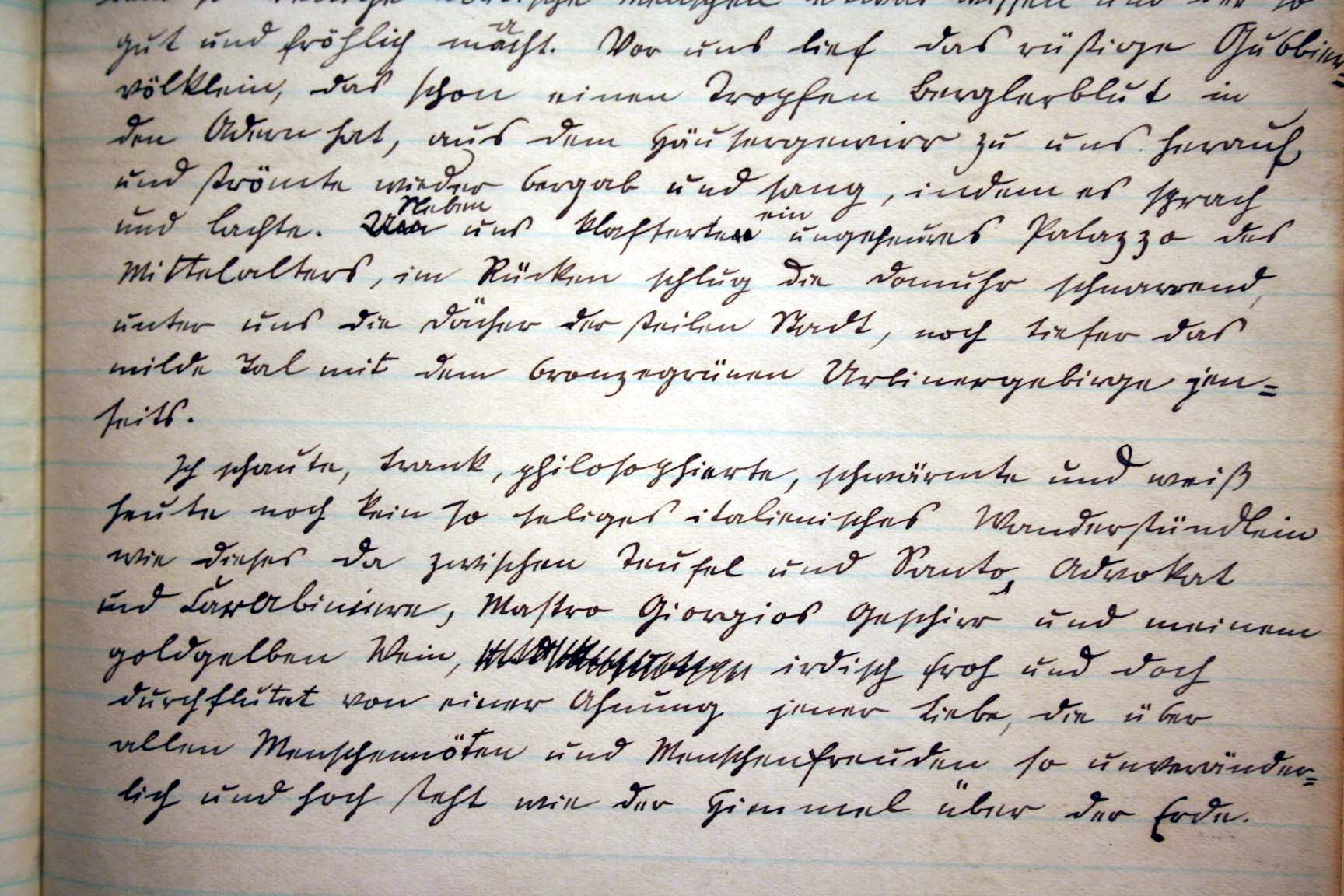 Manuskript Federer2